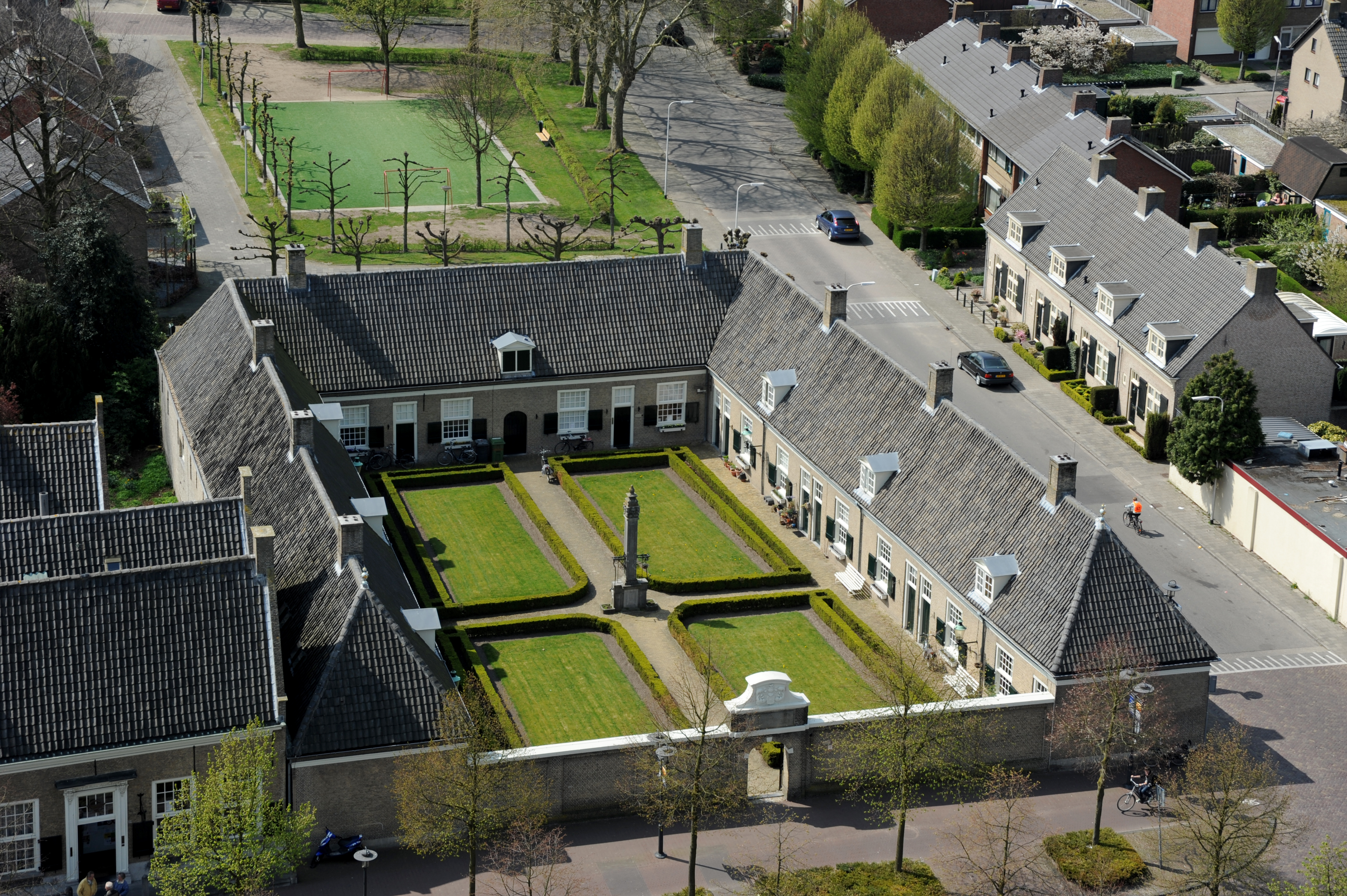 15396 Sint Paulushofje te Etten-Leur. Zicht vanaf de tegenover gelegen Lambertuskerk. Foto genomen door Han Eken - voorjaar 2010. Met naamsvermelding vrij te gebruiken voor niet-commerciële doelen. Het hofje is in 1681 gebouwd op het grondgebied van Justus de Nobelaer. Hij voerde het testament uit van Beatrix van Heussen, kinderloos gestorven in Leiden. Zij liet 25.000 gulden na voor een hofje voor 13 arme vrouwen. Deze ontvingen een kleine toelage per week, gratis turf en gratis zieken